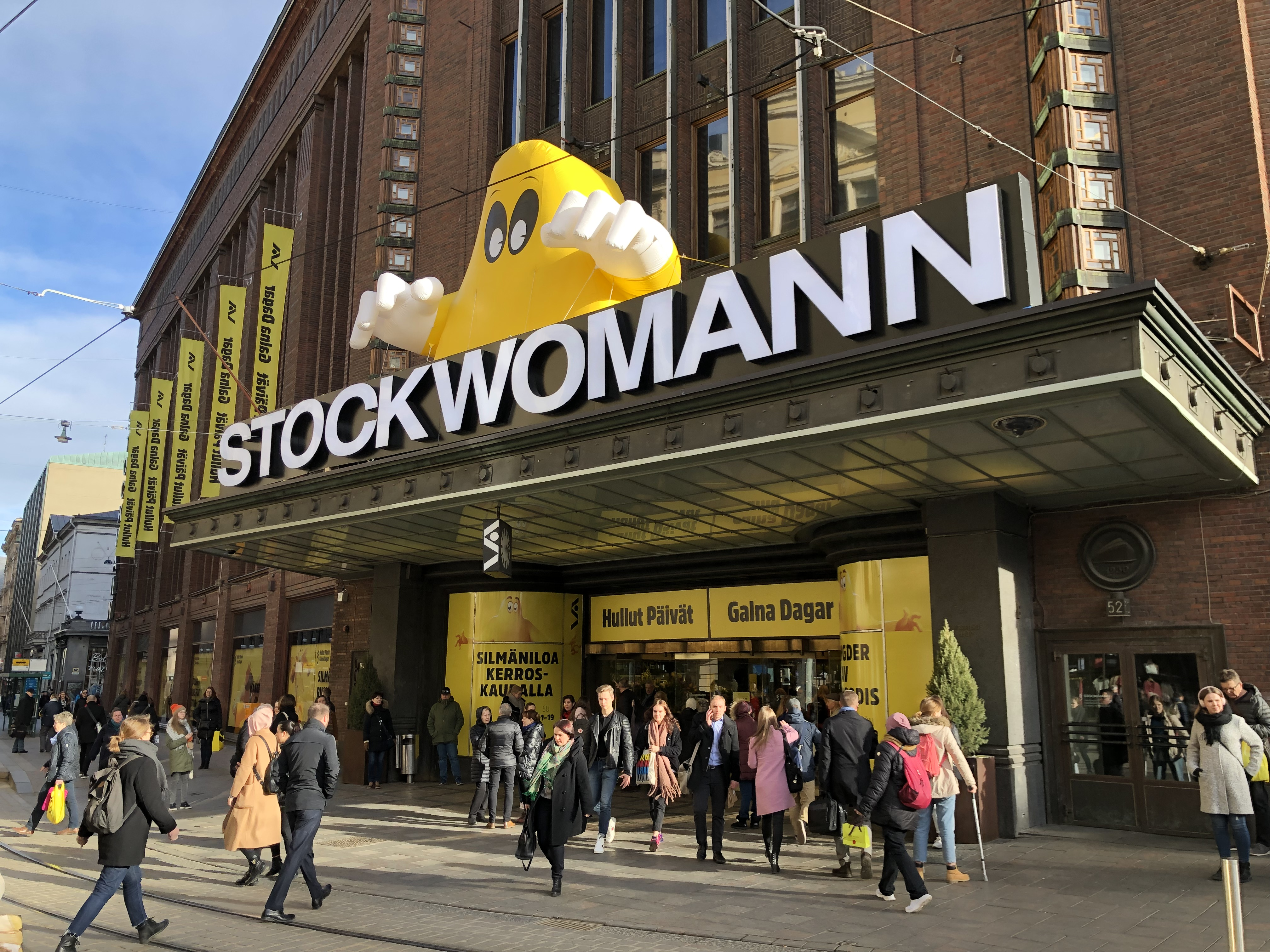 Helsingin keskustan Stockmannin pääsisäänkäynti Hullujen Päivien aikaan keväällä 2019. Stockmannin logo on muodossa “Stockwomann” osana Stockmannin sukupuolten tasa-arvokampanjaa.